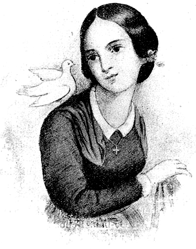 Dukai Takách Judit vagy Dukai Takács Judit, költői nevén Malvina (Duka, 1795. augusztus 9. – Sopron, 1836. április 15.) magyar költőnő, neve Berzsenyi Dániel versének címéből vált ismertté.